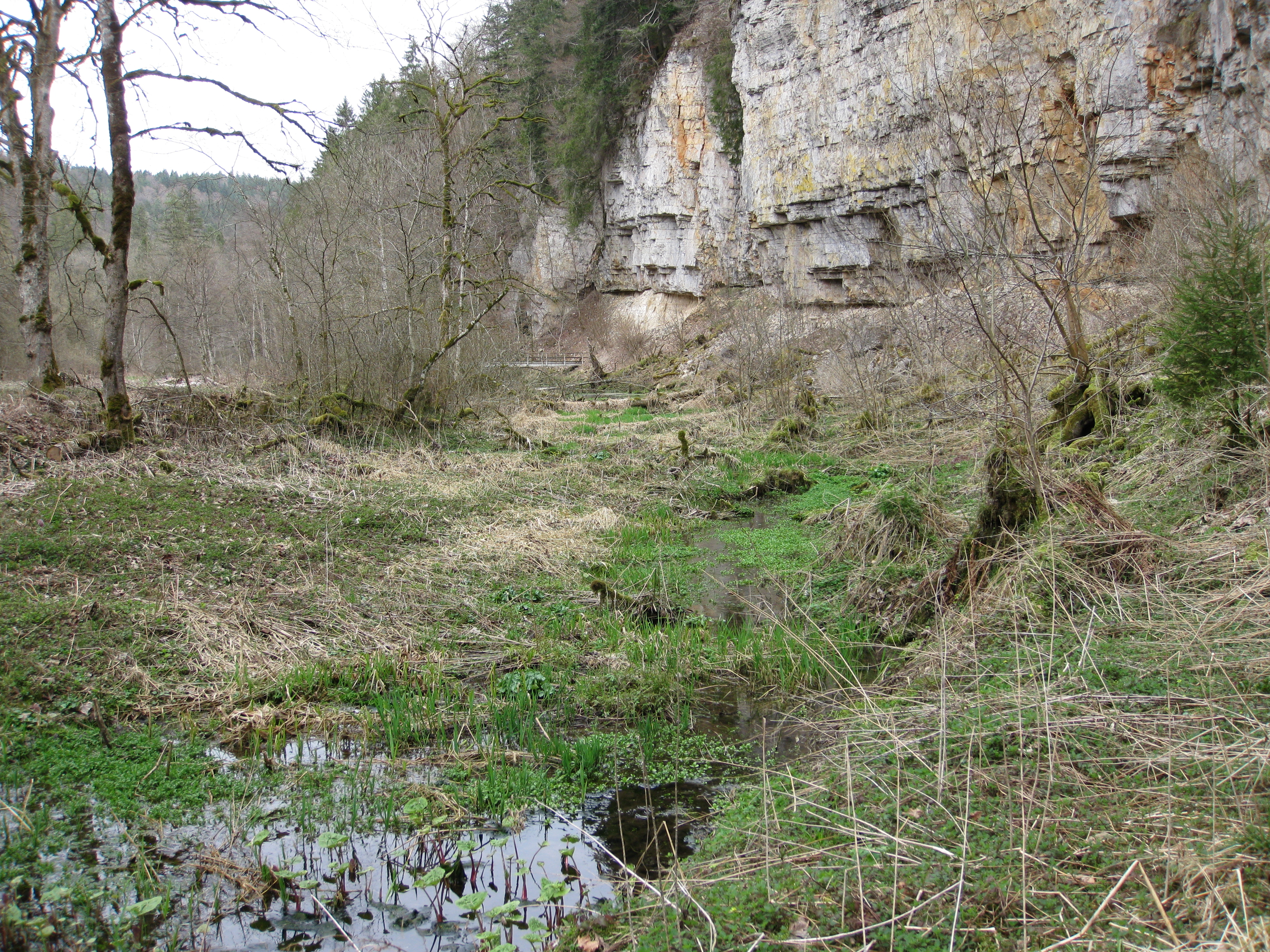 Felsenweiher unterhalb des ehemaligen Kurorts Bad Boll in der Wutachschlucht.